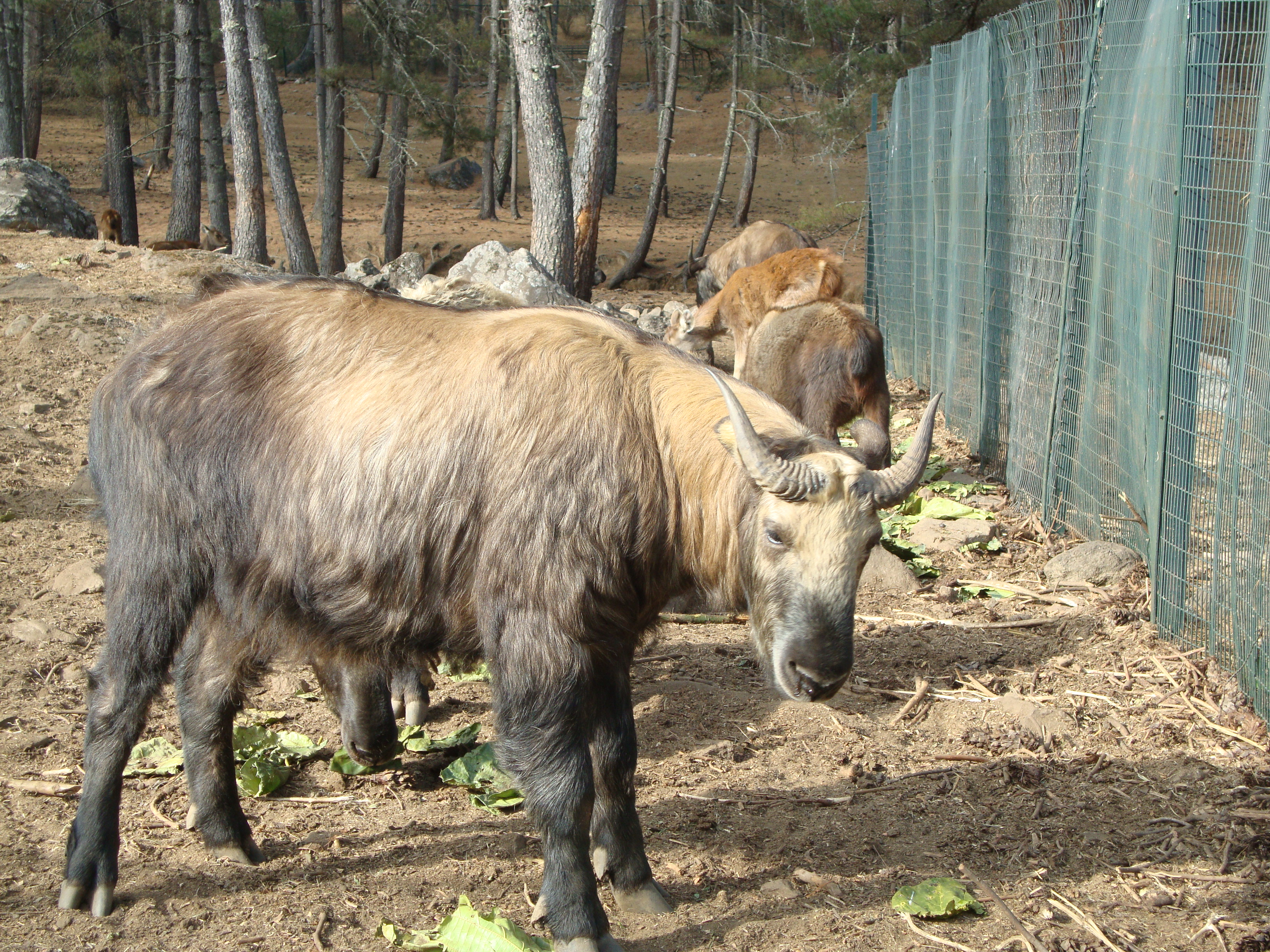 ഭൂട്ടാന്റെ ദേശീയ മ്രുഗമായ ടക്കിൻ